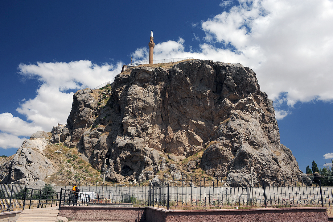 Yukarı Tekke Sivas